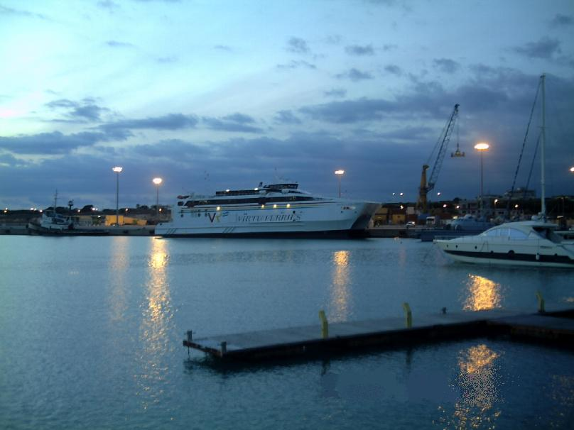 Foto in notturna del porto di Pozzallo